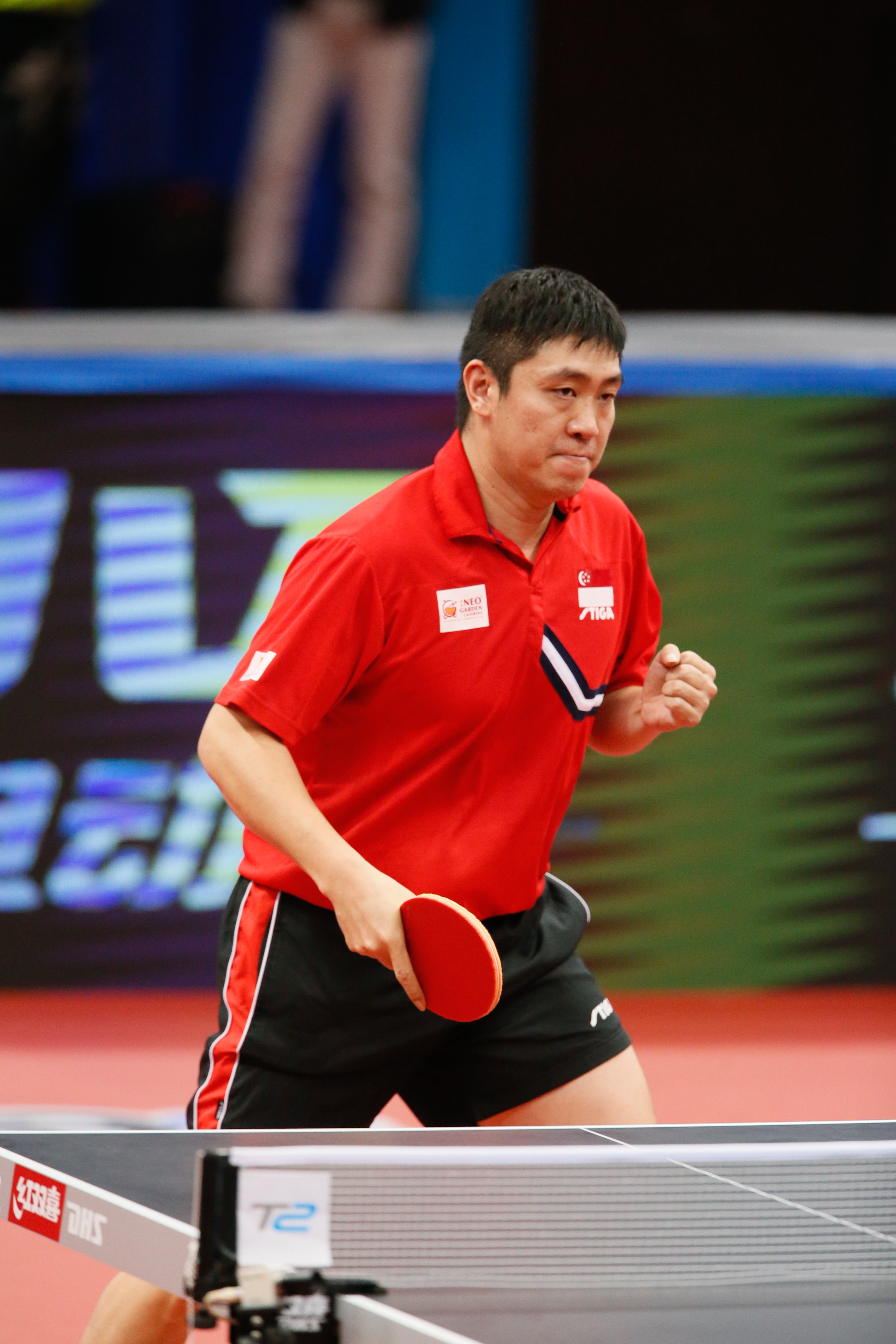 _K0K9022